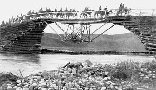 Переход Красной армии через р. Душанбинка